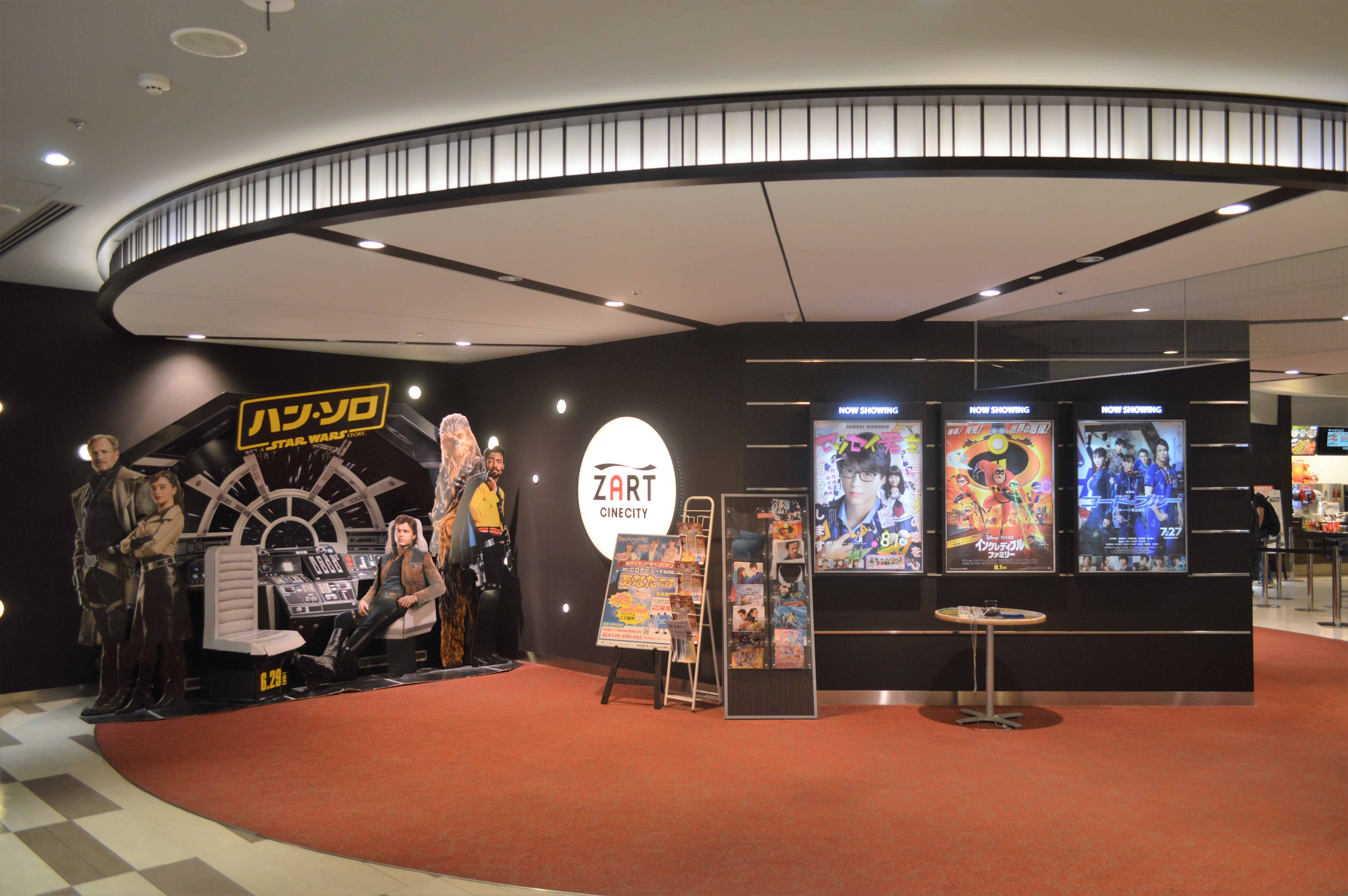 静岡市の新静岡セノバにある映画館（シネコン）「シネシティザート」。